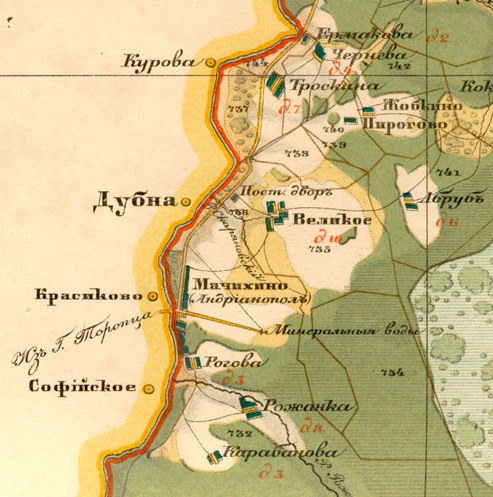 Фрагмент карты Тверской губернии